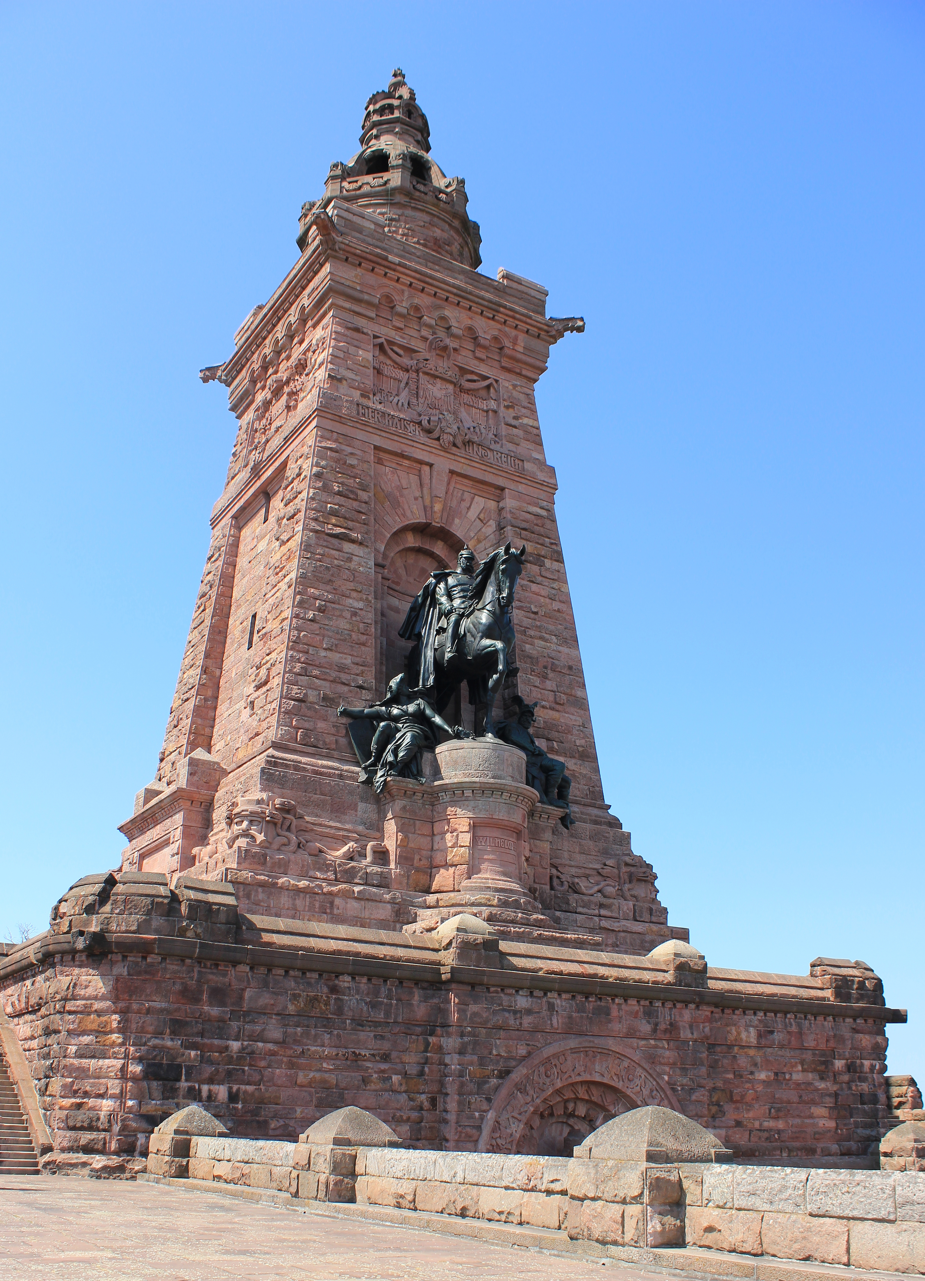 Kyffhäuserdenkmal. Sachsen.